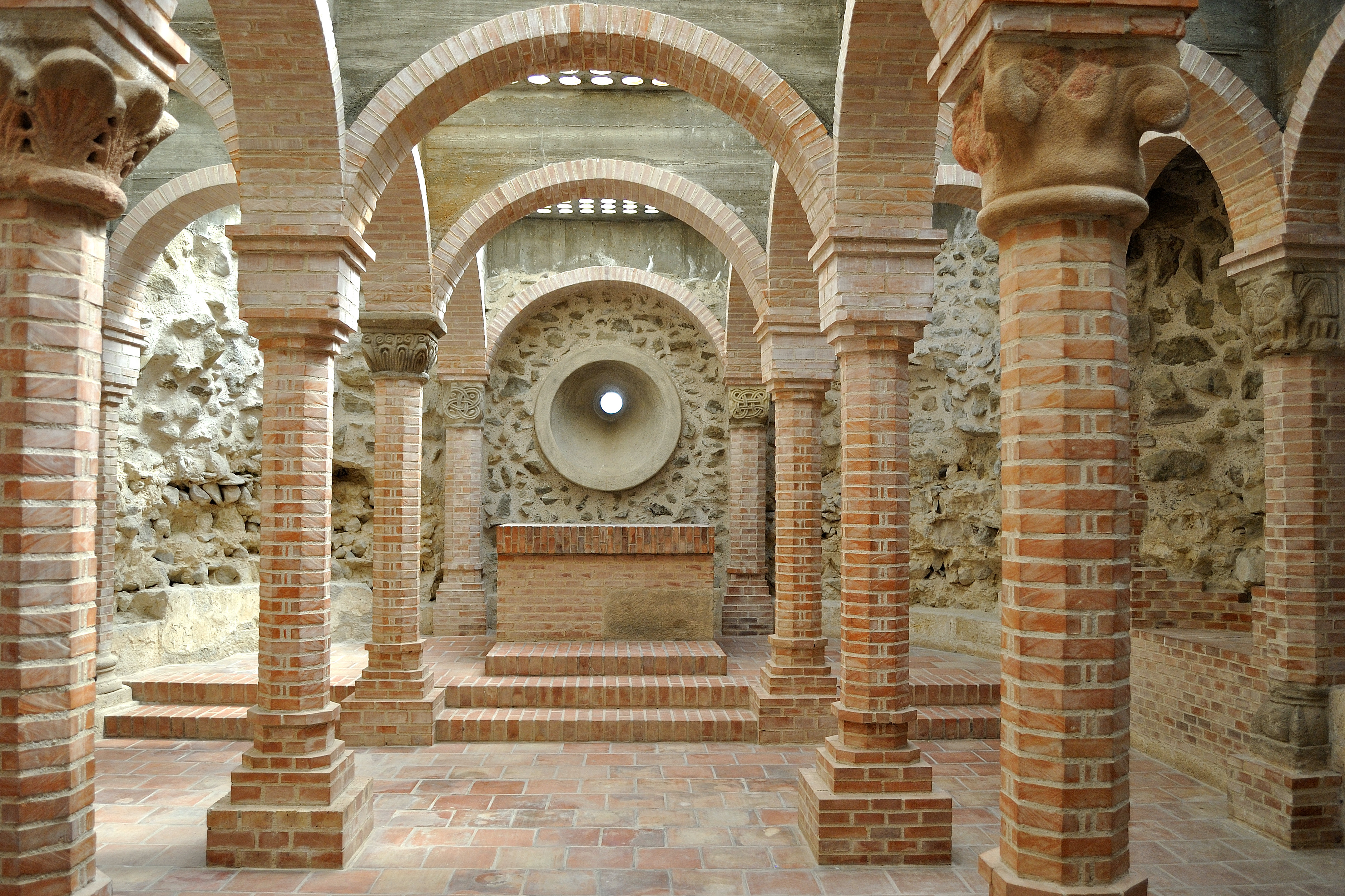 prépostsági romok, Dömös This is a photo of a monument in Hungary. Identifier: 6144